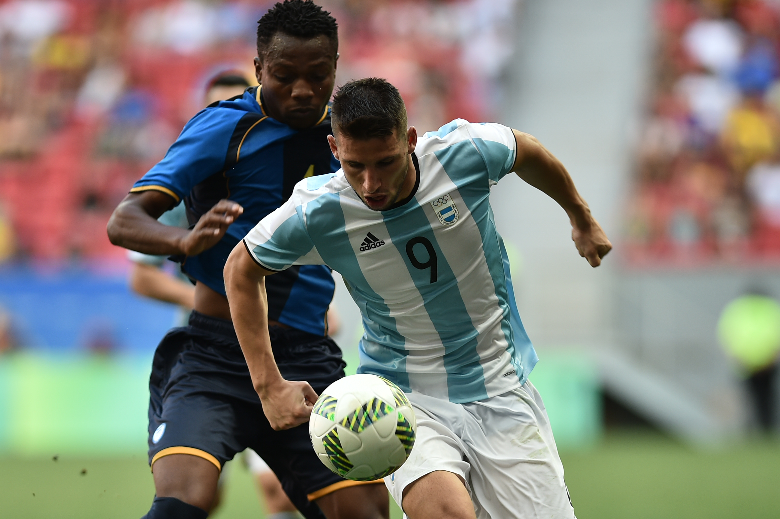 Estádio Nacional de Brasília Mané Garrincha, Brasília, DF, Brasil, 10/8/2016 Foto: Andre Borges/Agência Brasília Argentina e Honduras empataram por 1x1 nesta quarta-feira (10), no Estádio Mané Garrincha, em partida pelo grupo D do futebol masculino nas Olimpíadas 2016. O placar classificou Honduras para a próxima fase da competição e tirou a seleção argentina masculina da Olimpíada. Partido entre Argentina y Honduras por fase de grupos.